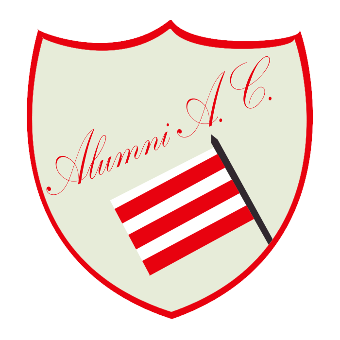 Escudo del Alumni Athletic Club